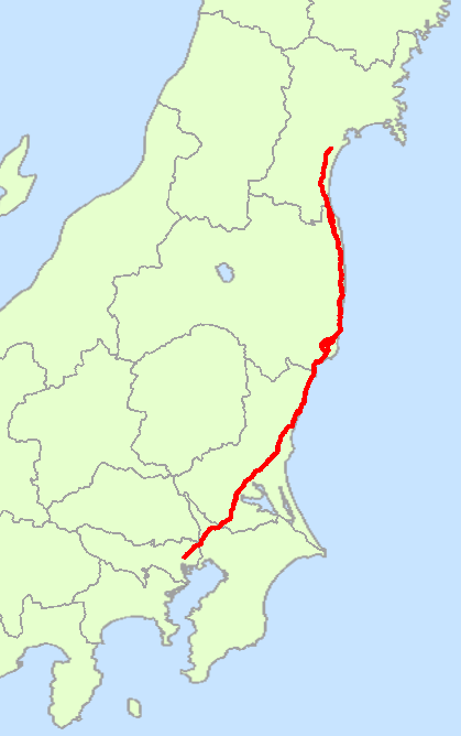 国道6号線の経路概略図